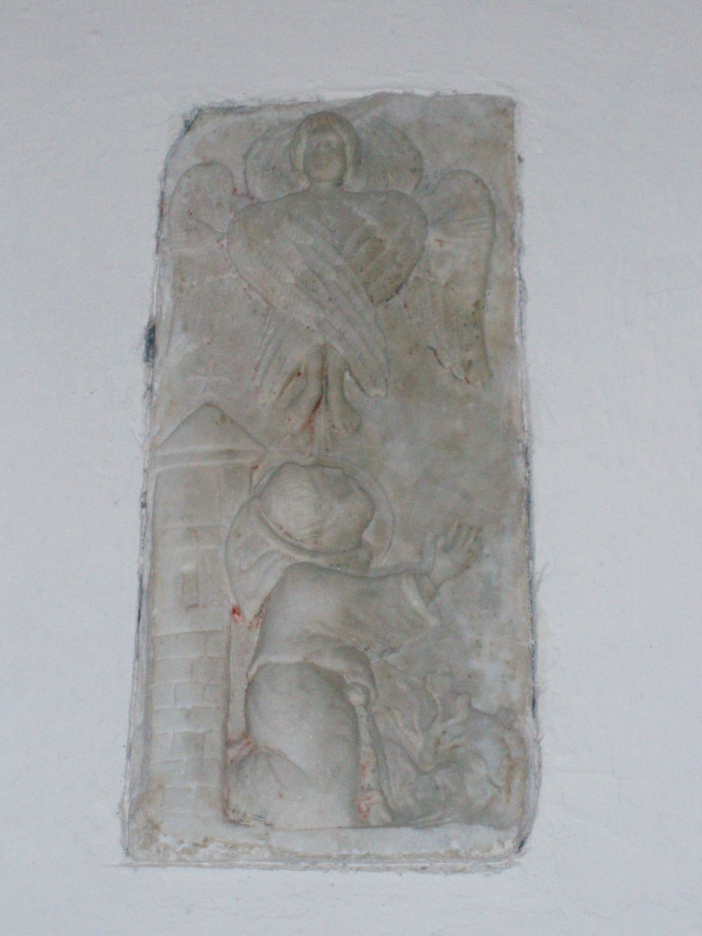 Santuario della Verna - 19 - Cappella delle Stimmate - Antica raffigurazione delle Stimmate